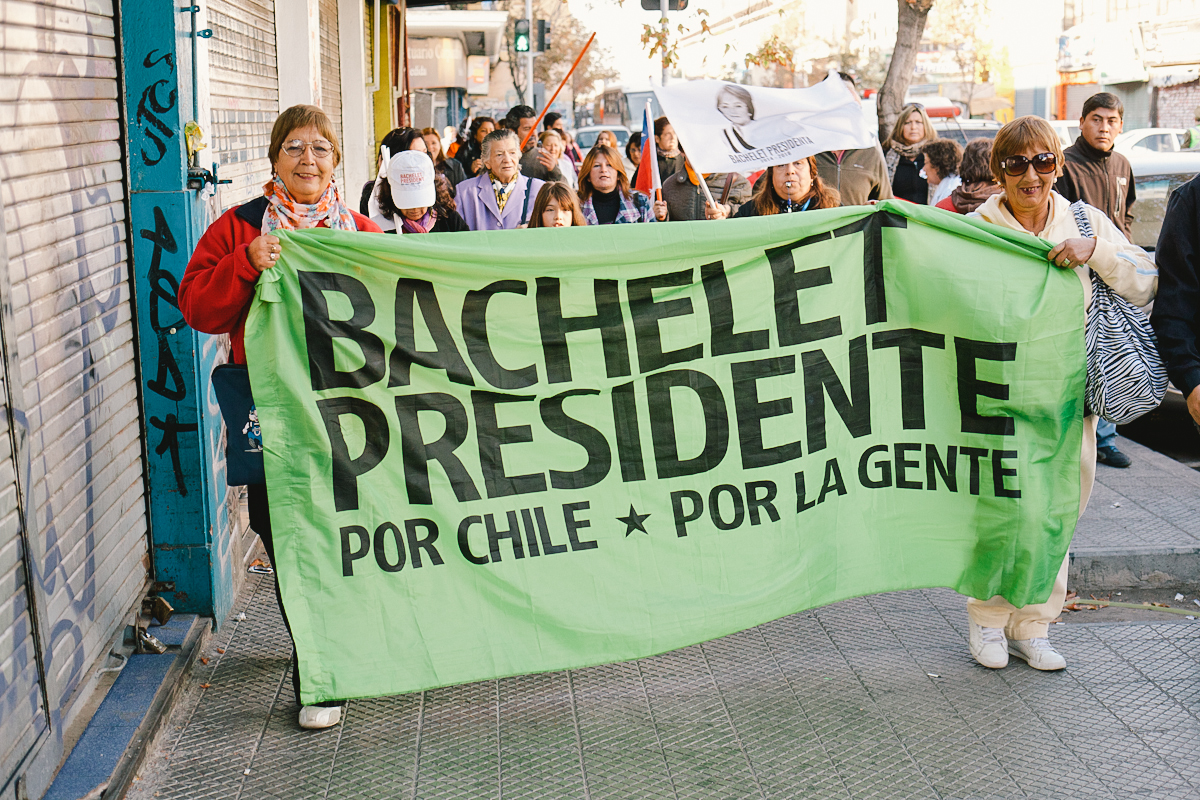 Banner de la campaña presidencial de 2006 de Michelle Bachelet, utilizada durante la proclamación del Partido Socialista y Partido por la Democracia para la precandidatura presidencial de 2013.